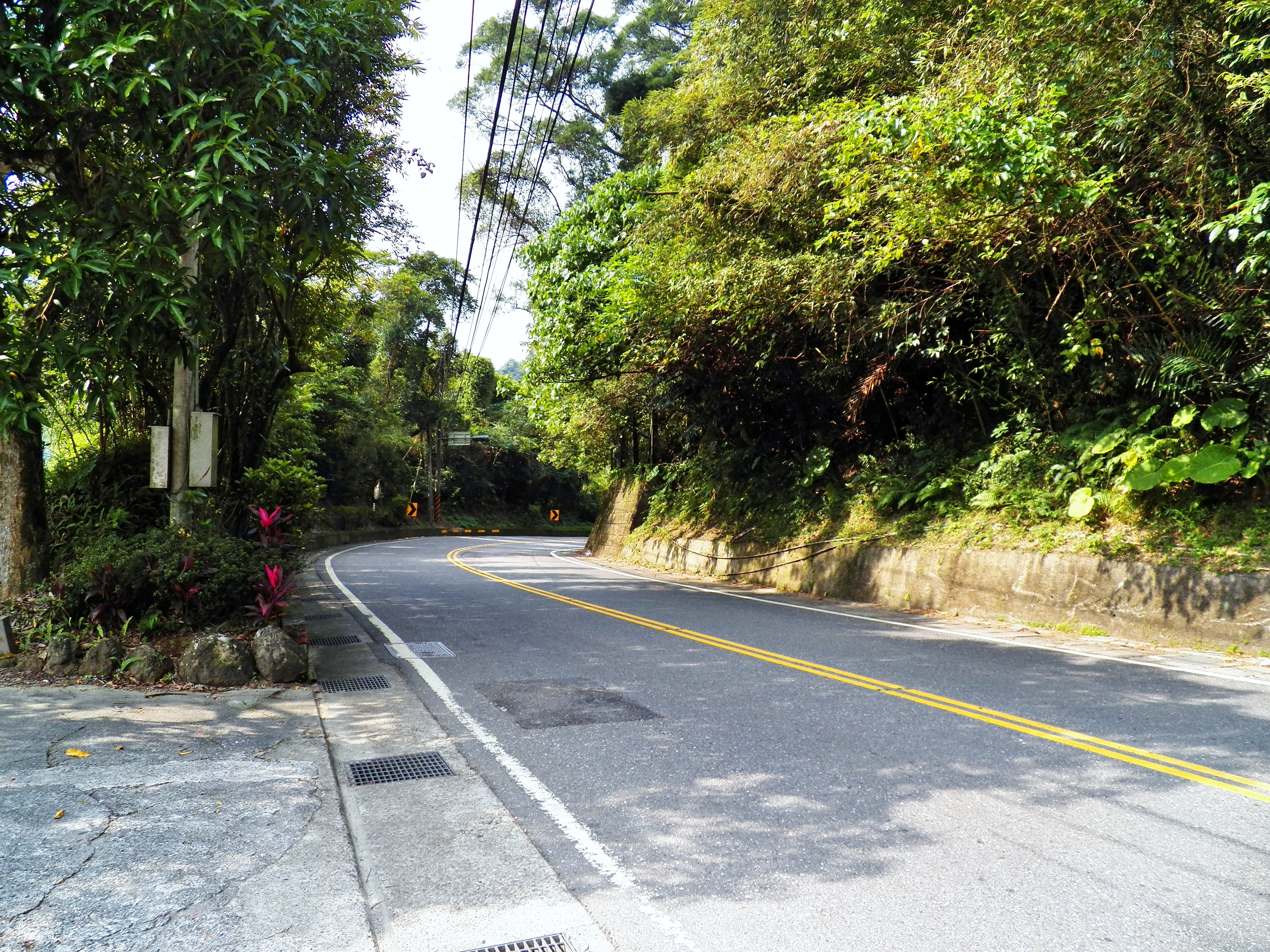 新北市新店區北宜路三段62號前的北宜公路（臺9線）彎道。